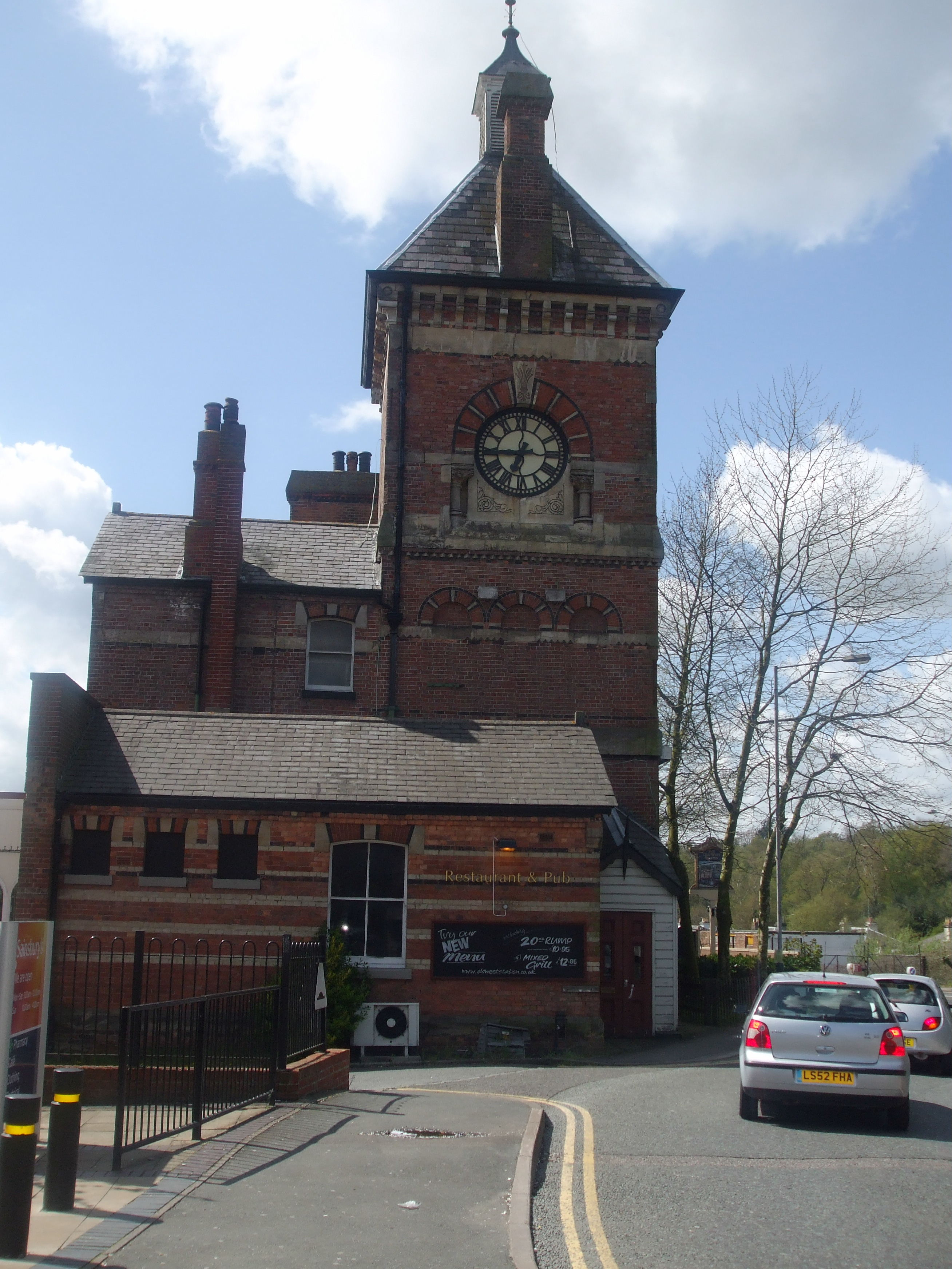 Tunbridge Wells West Station, Kent